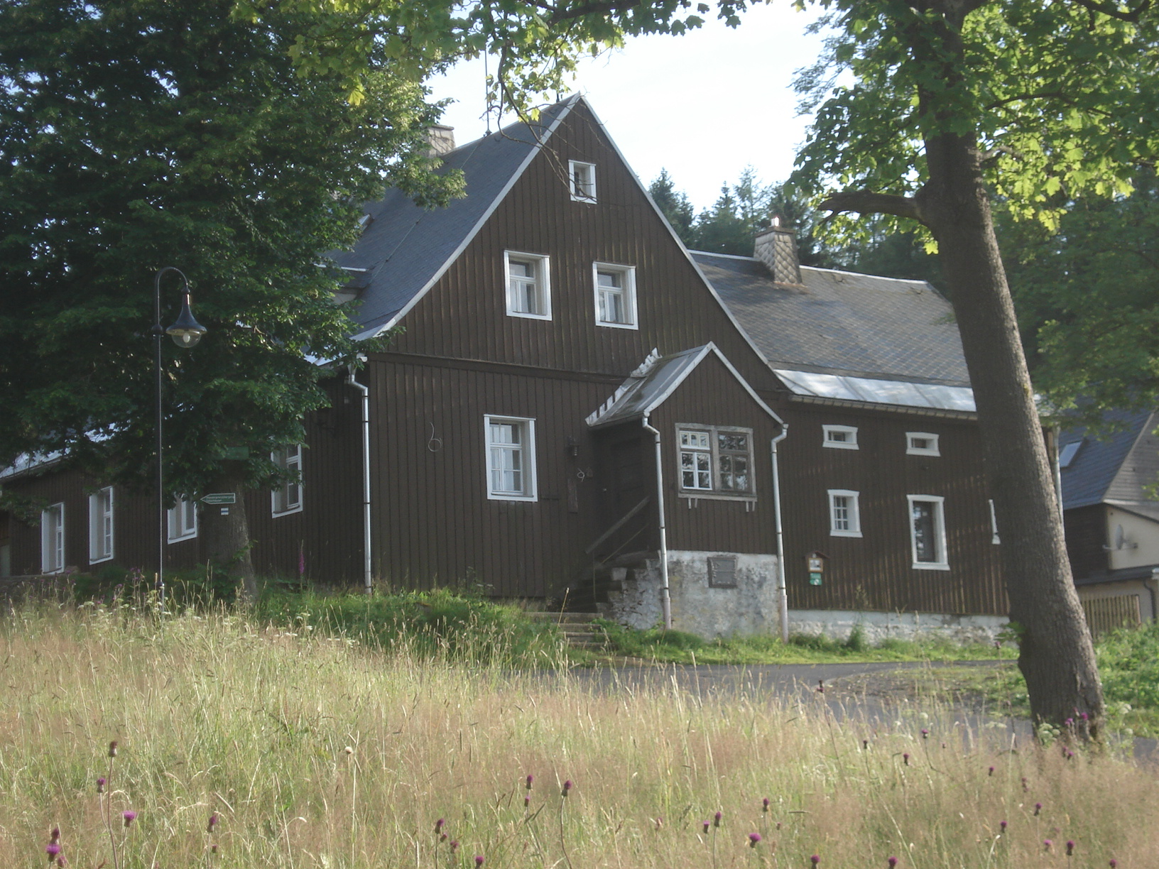 Forsthaus in Tellerhäuser/Erzgebirge